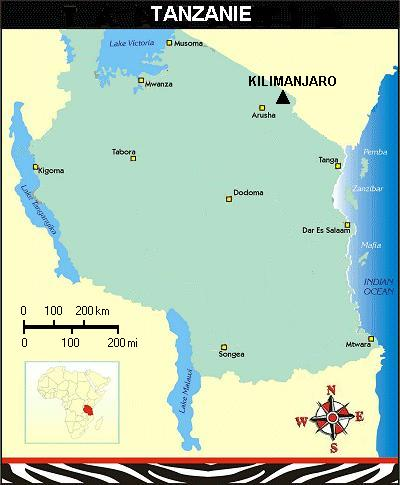 Carte indiquant la position du mont Kilimanjaro en Tanzanie et la position de la Tanzanie en Afrique.